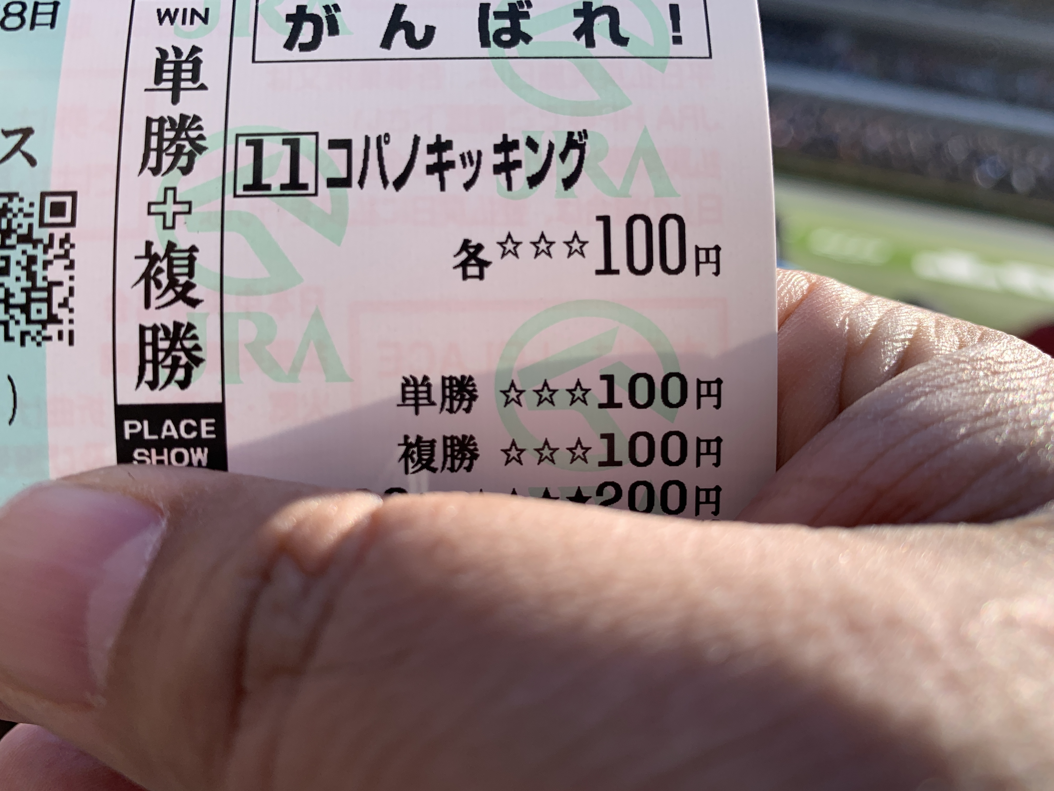 コパノキッキングの応援馬券